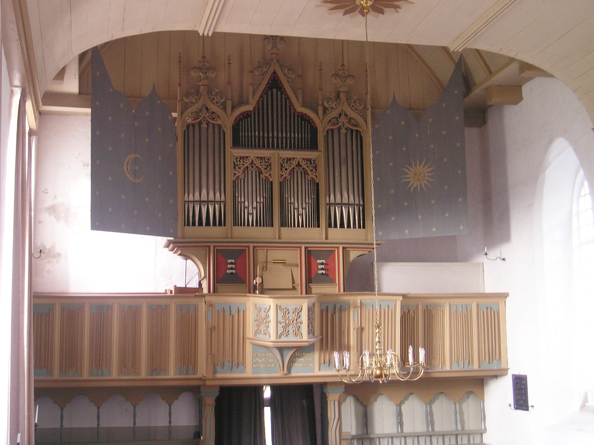 Orgel der Ev. Kirche Rysum (selbst fotografiert im Oktober 2004)